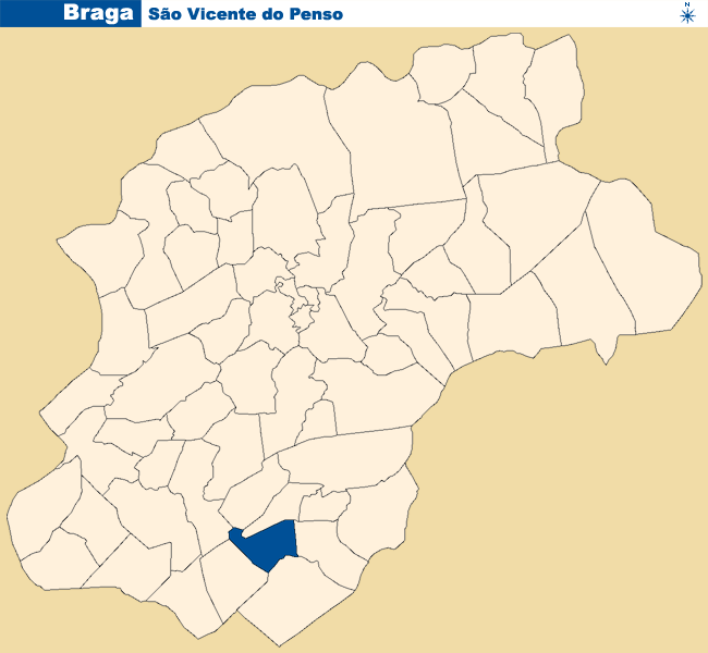 Localização de S. Vicente de Penso no concelho de Braga.